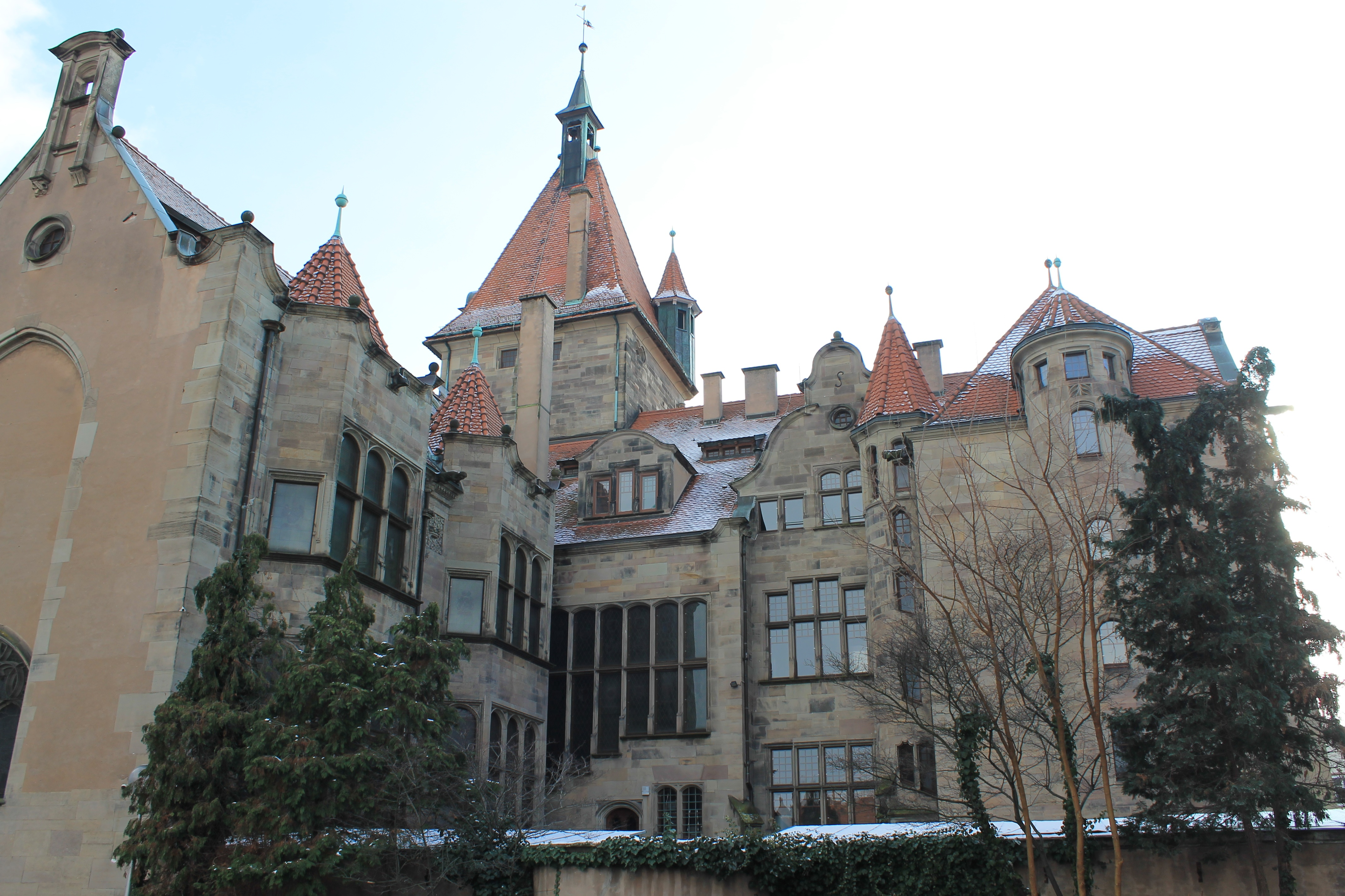 Haguenau